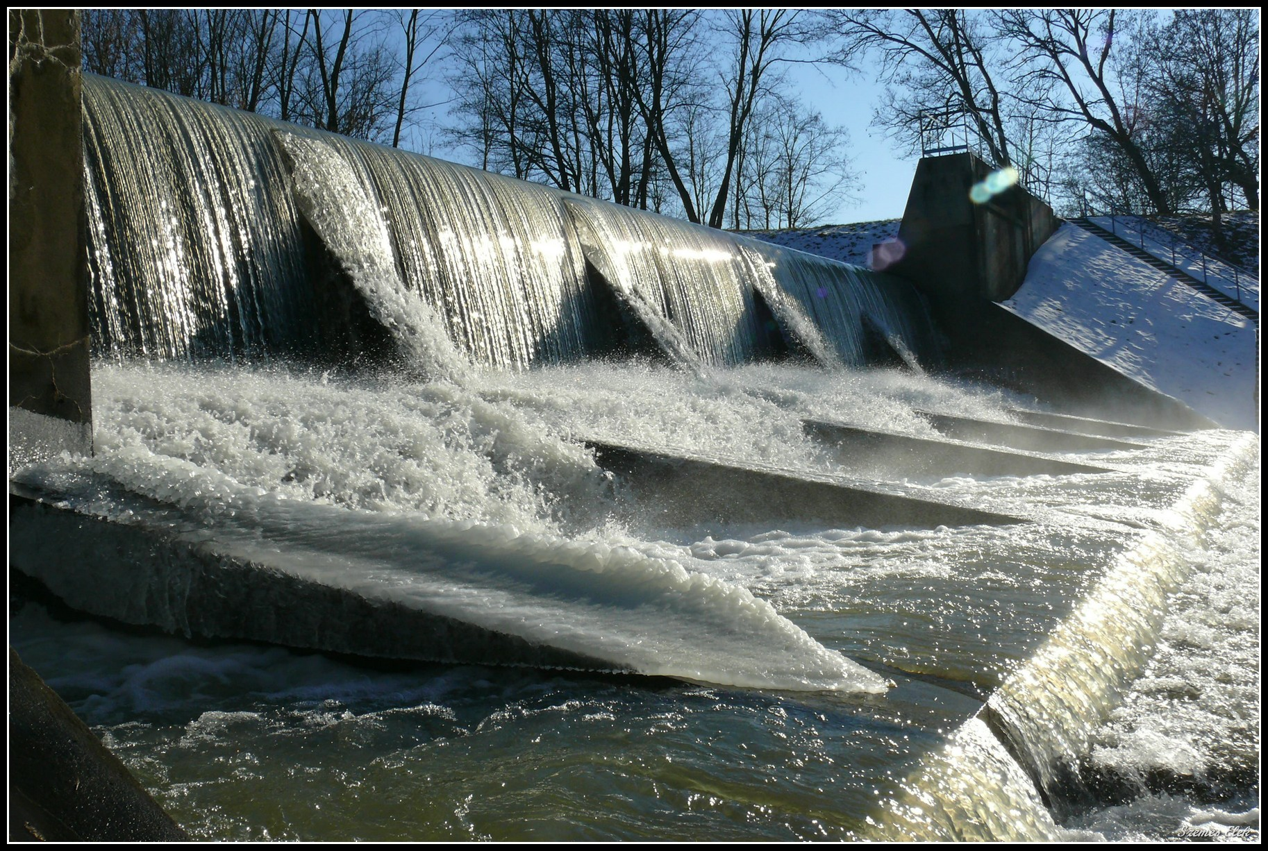 Tiszakóród, Hungary